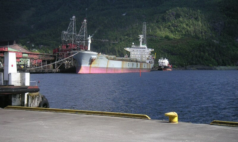 Biletet er teken frå dampskipskaien i Sauda, og viser Eramets hamneområde i bakgrunnen Fotograf: Brukeren neitakk sjølv